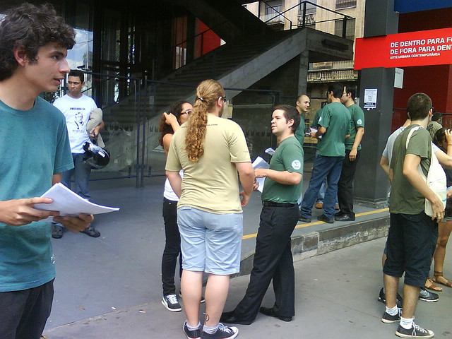 Integralistas brasileiros em panfletagem no MASP. São Paulo, SP.